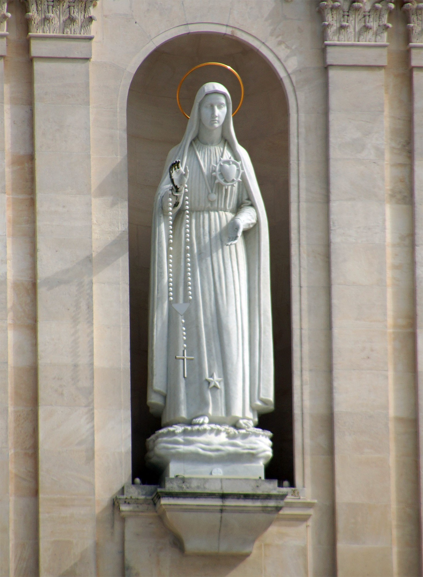 FATIMA FATIMA: GEHEIMNISSE Von FATIMA